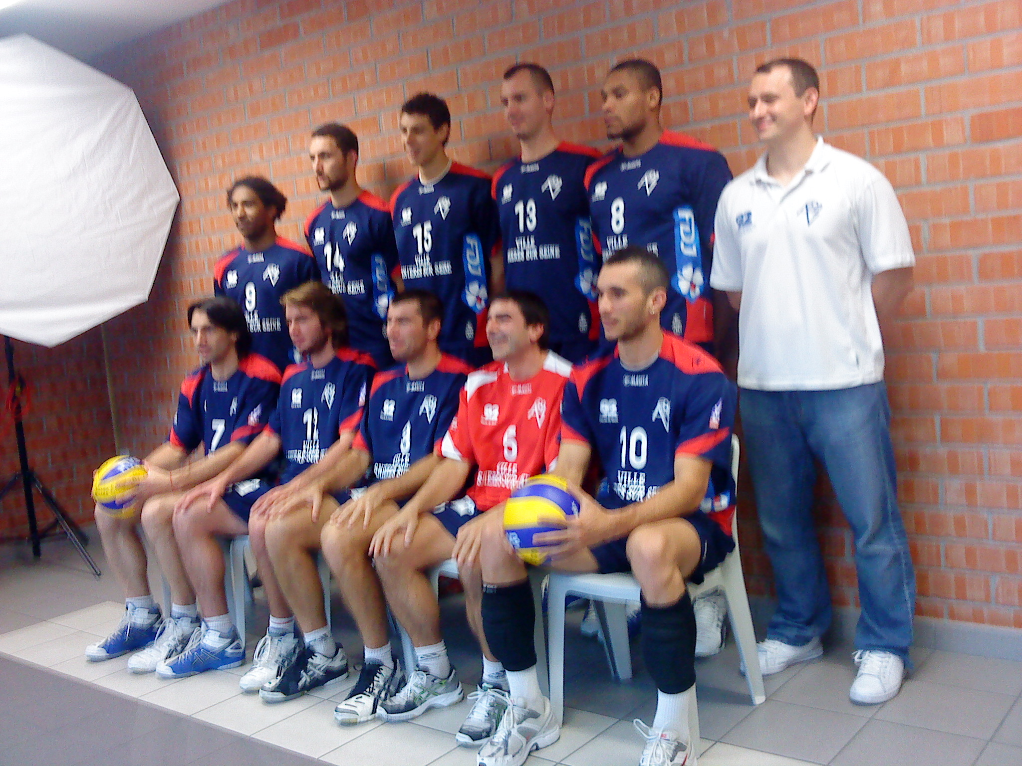 L'équipe d'Asnières Volley 92 pour la saison 2010-2011